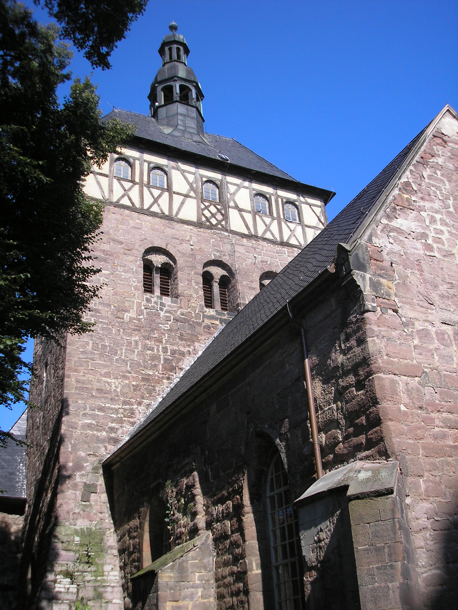 Die Marienkirche in Artern (Thüringen)